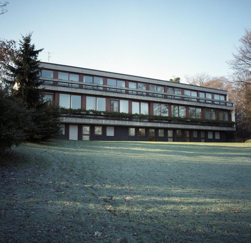 8.12.1987 Landesvertretung von Nordrhein-Westfalen beim Bund, Dahlmannstr. 2